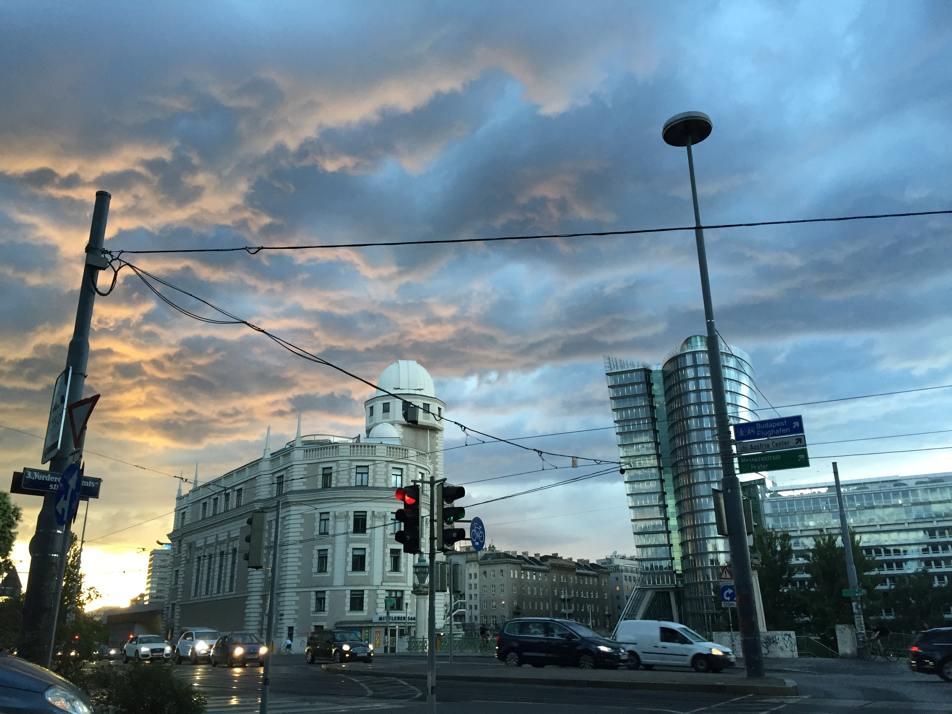 Urania Sternwarte, Wien, 2015